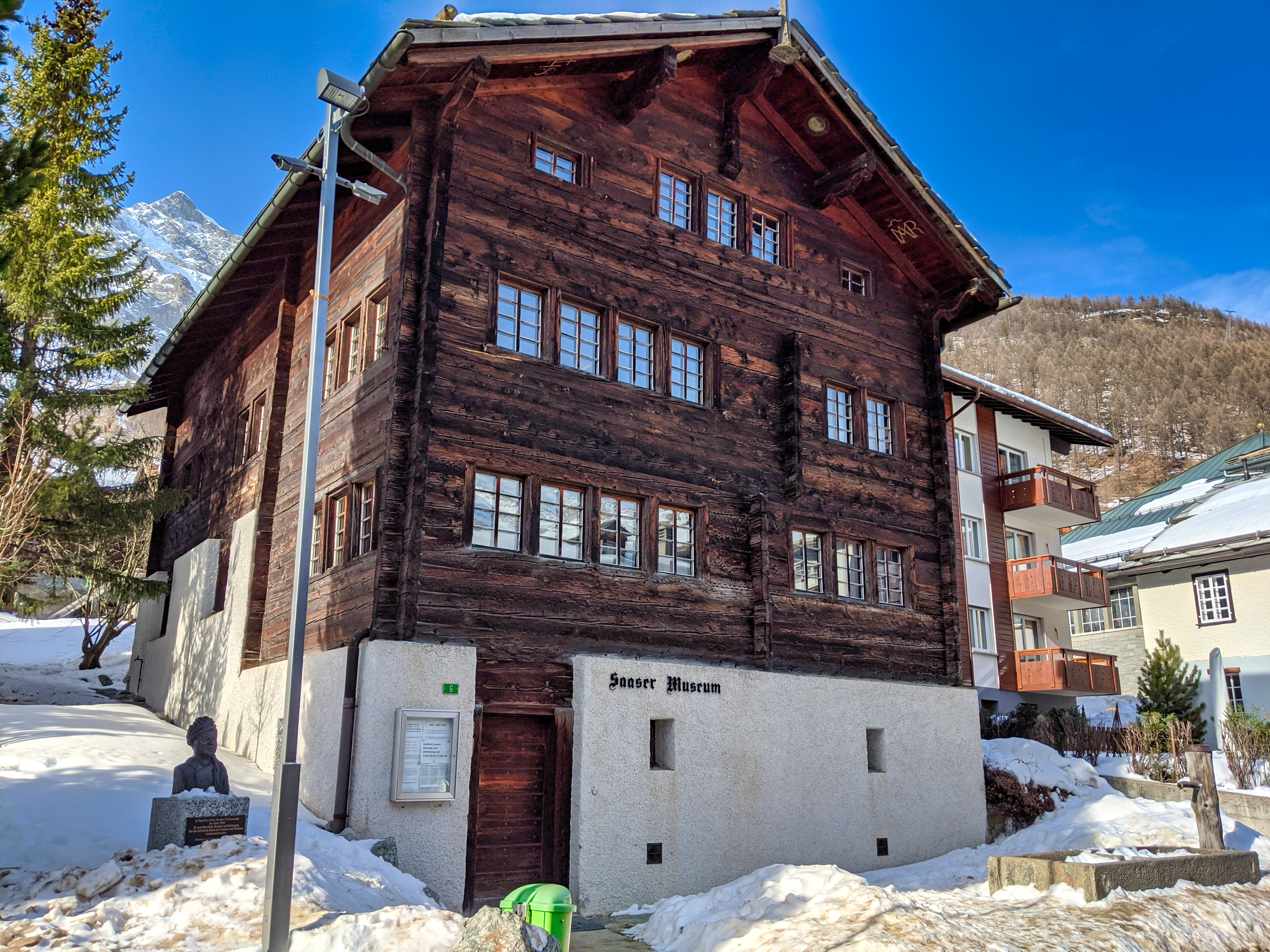 Heimatmuseum, Saaser Museum (Aufnahme: 2020)